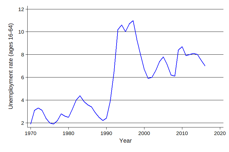 Arbetslöshet i procent från 1976 till 2004 för befolkningen i åldrarna 16-64 år.